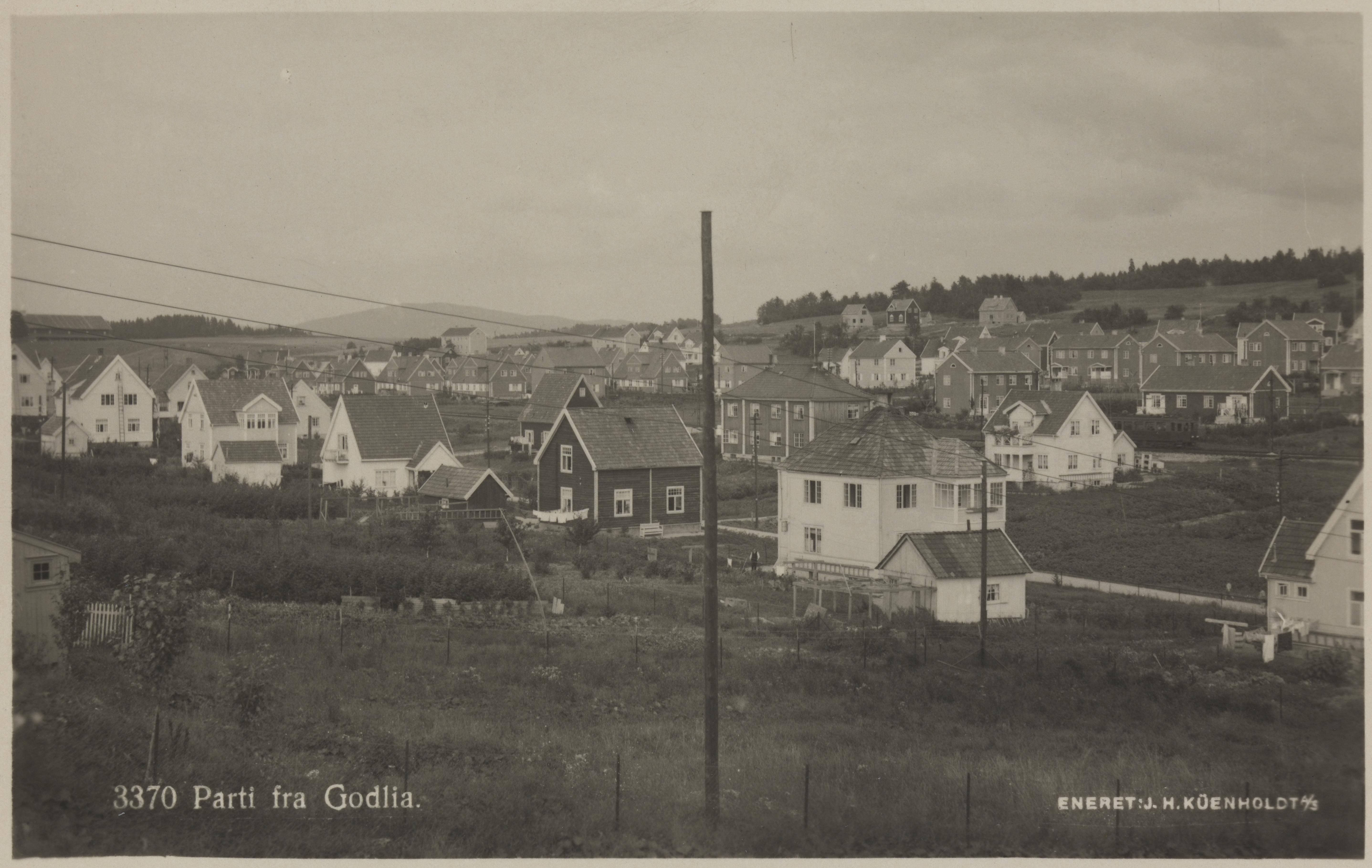 Bildet er hentet fra Nasjonalbibliotekets bildesamling Godlia,Østensjø, Oslo, Oslo